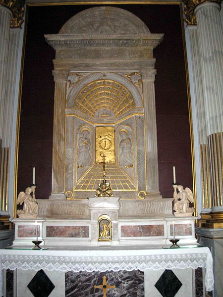 Colle di Val d'Elsa - Altare del Sacro Chiodo della crocifissione.